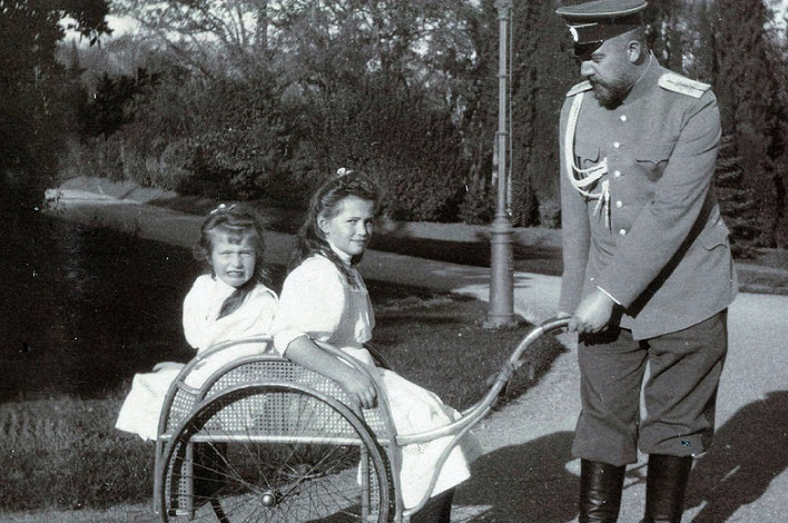 エフゲニー・ボトキンとマリア皇女、アナスタシア皇女